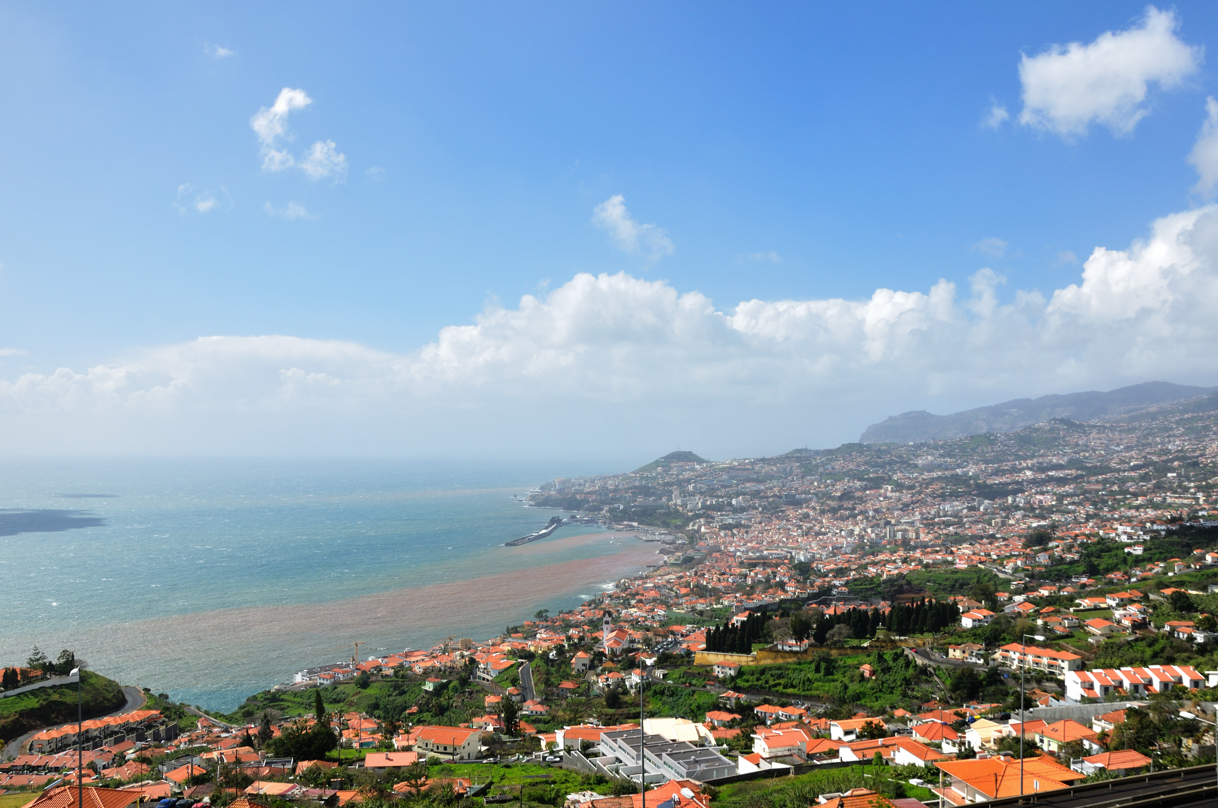 Portugal, Funchal